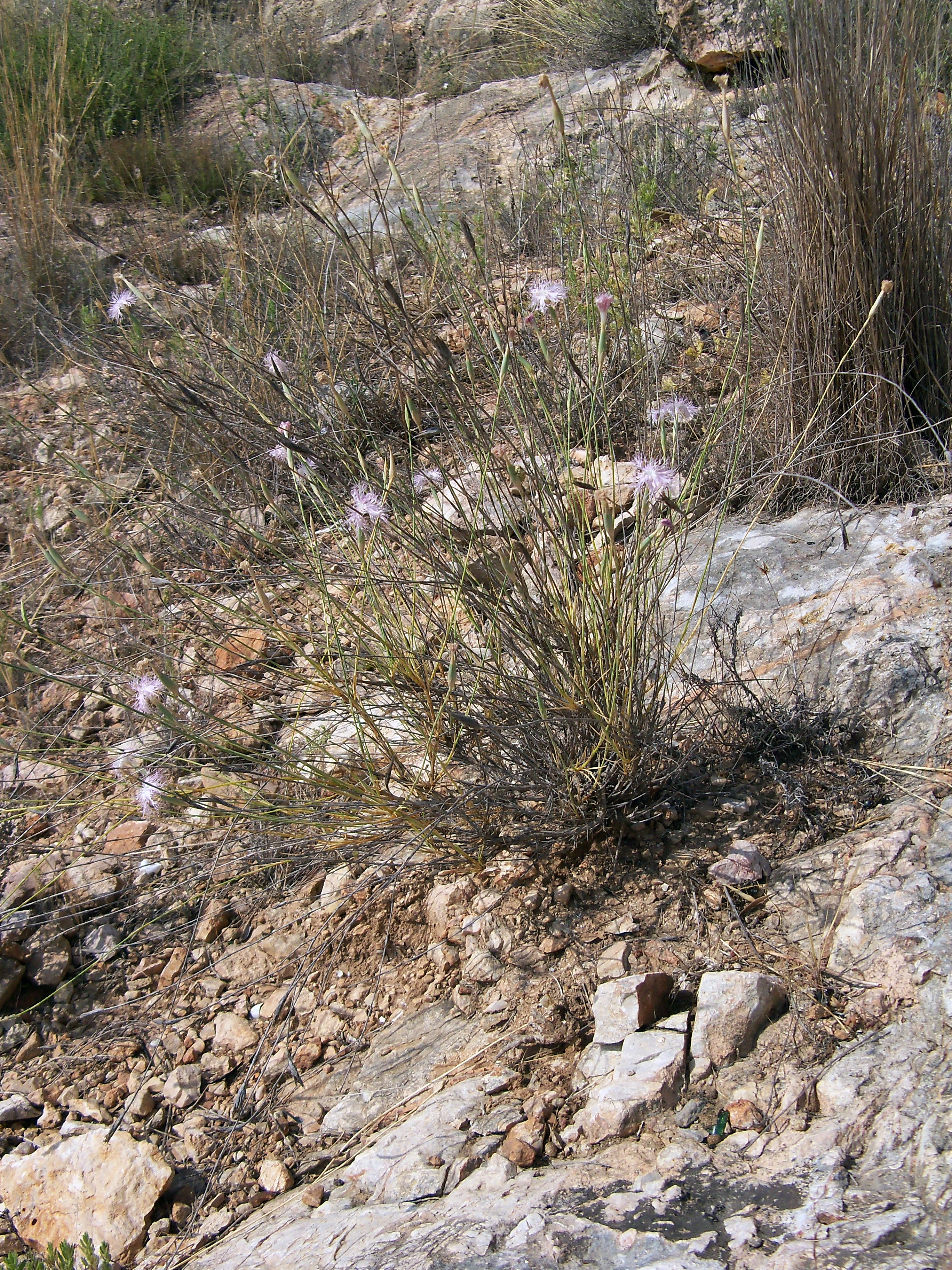 Dianthus broteroi : Hábitat y aspecto general - Cabezo de los Ojales, Albatera (Alicante, España).